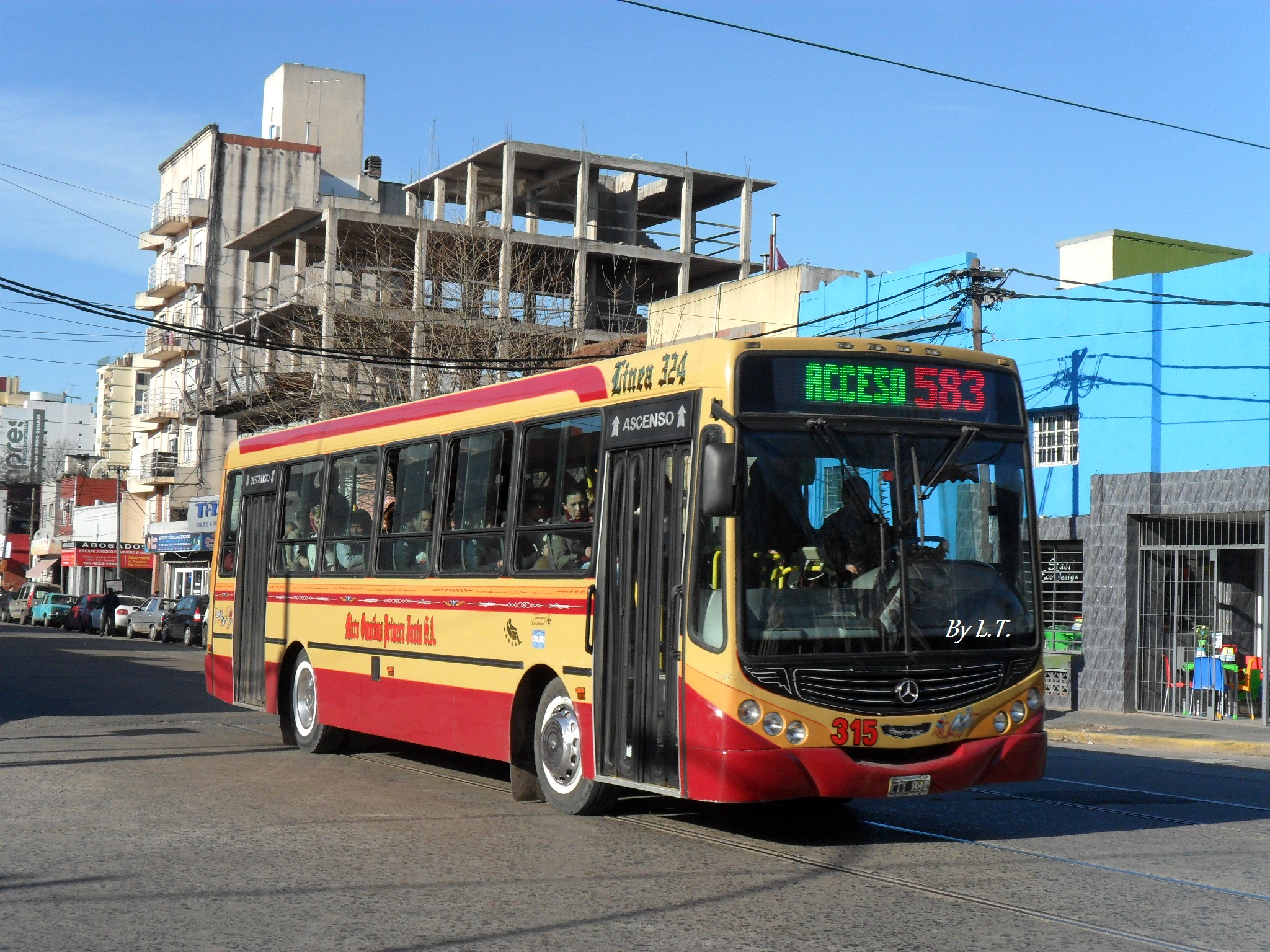 Colectivo de la Linea 583 transitando por Av. Carlos Pellegrini